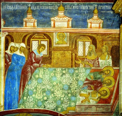 Готский воин приносит клятву перед мощами святых Гурия, Самона и Авива. Фрагмент росписи придела святых Гурия, Самона и авива ц. прор. Илии в Ярославле. Посл. четв. XVII в.